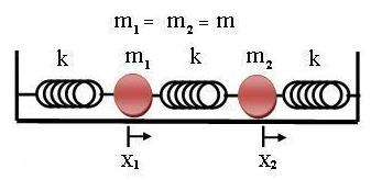 Sistema massa mola duplo.